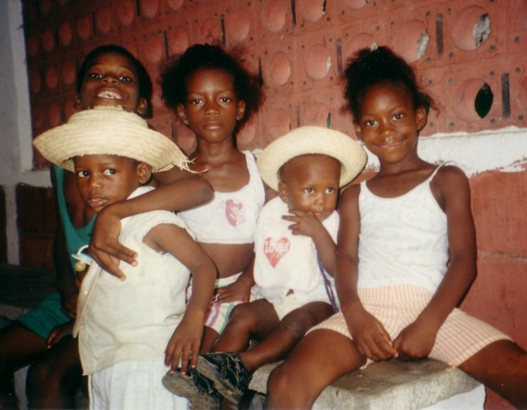 Gariguna children, Livingston, Guatemala